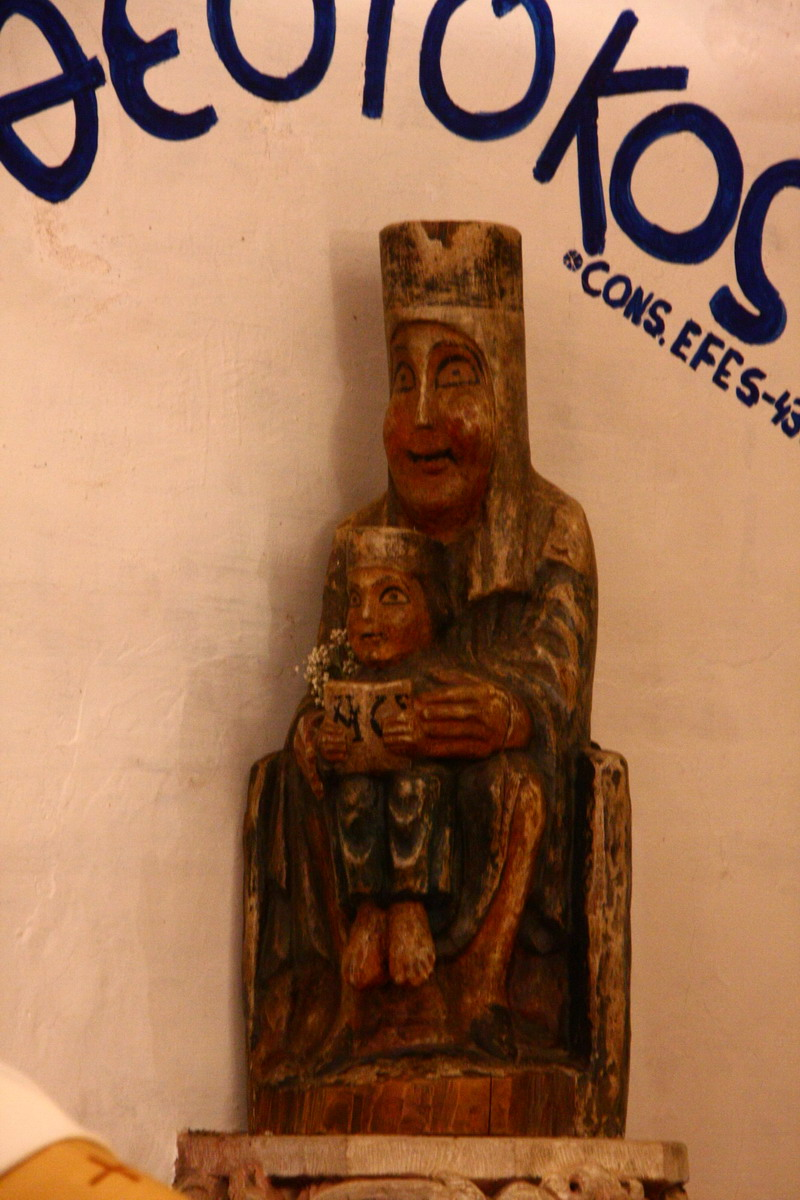 Gallifa, Mare de Déu de l'Ecologia, dins de l'ermita del mateix nom al castell de Gallifa (Vallès Occidental -Catalunya).